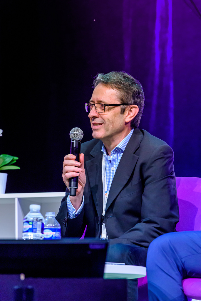 Cédric Thomas lors du Paris Open Source Summit, 16 - 19 Novembre 2015.